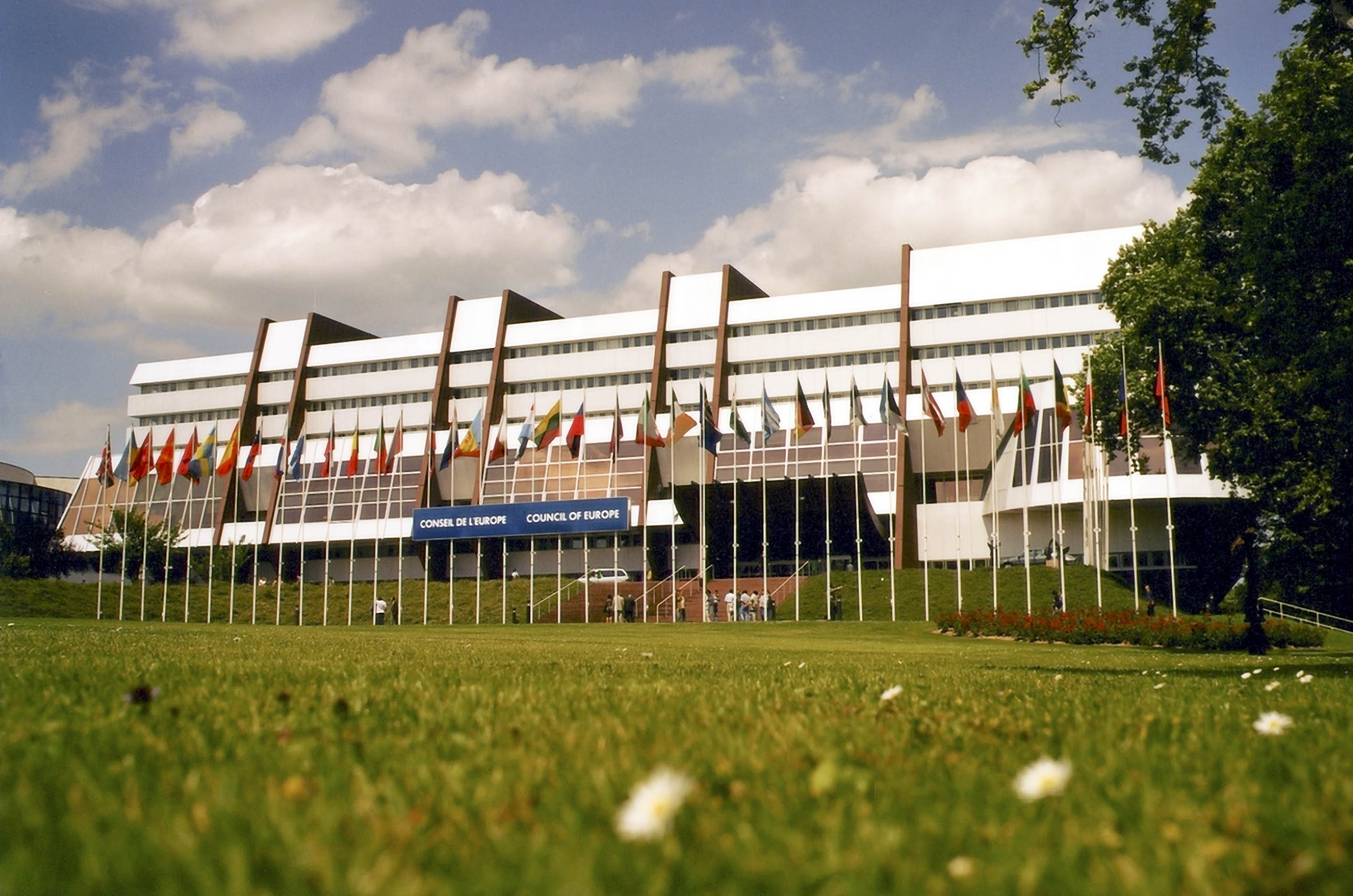 Palais de l'Europe Strasbourg - Architecte Henry Bernard